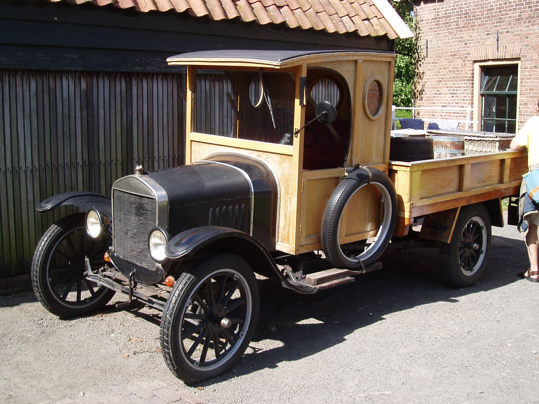 Ford TT in Zuiderzeemuseum in the Netherlands